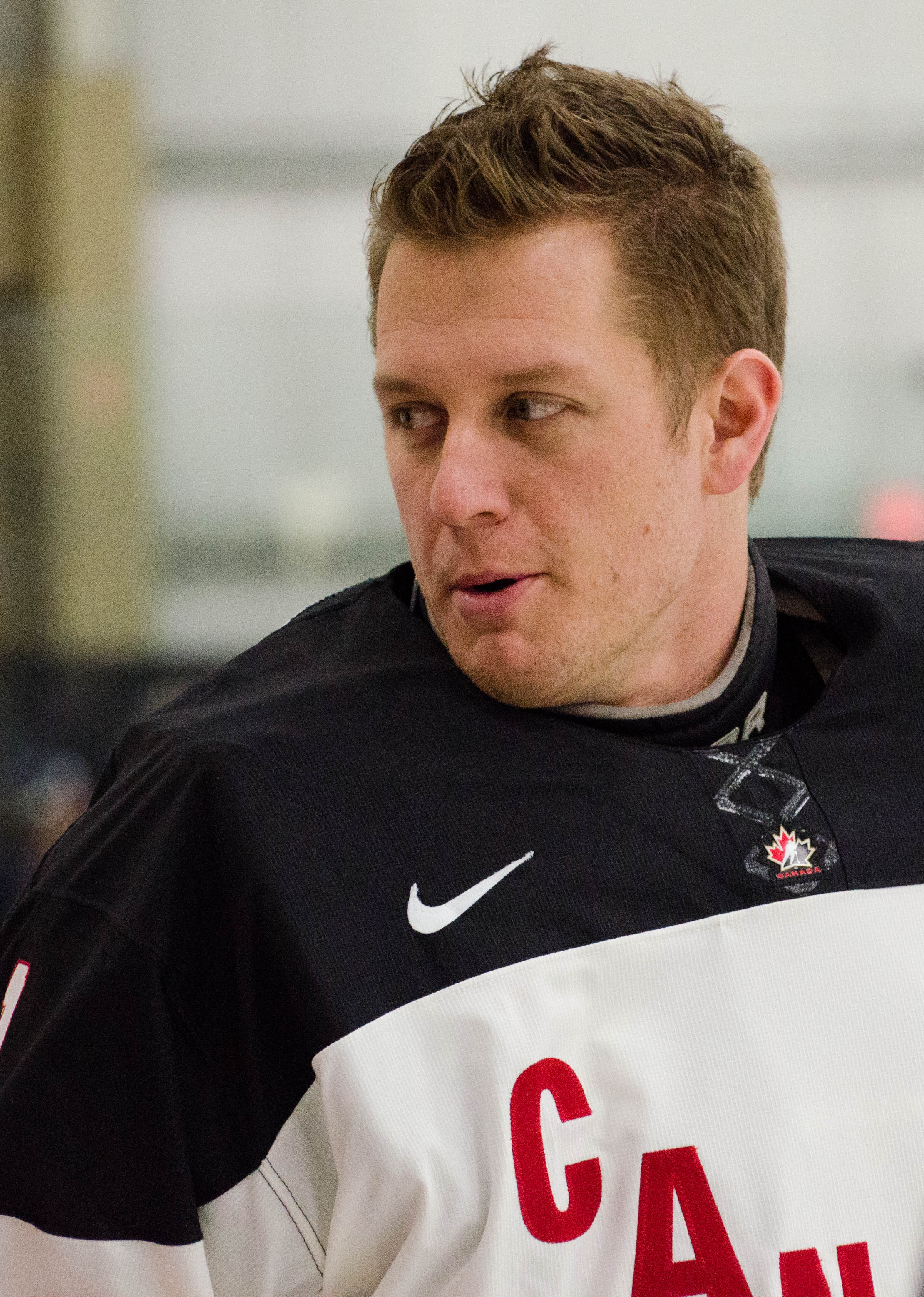 Dominic Larocque, 2015